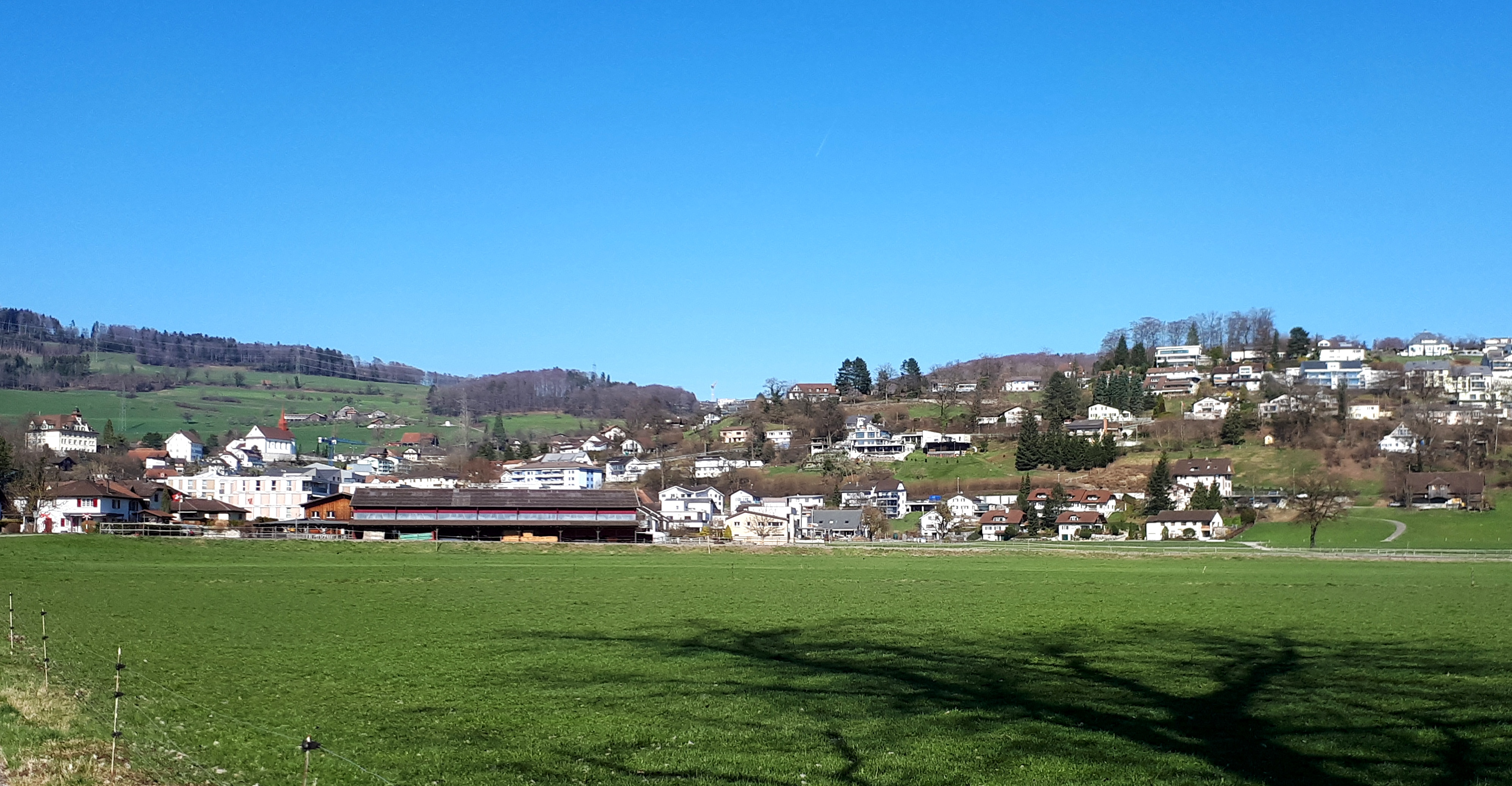 Büron